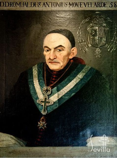 Retrato de Romualdo Mon y Velarde (1749-1819)